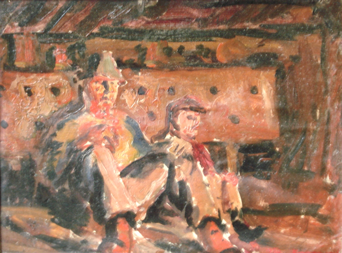 The moment of the miner's rest,about 1950